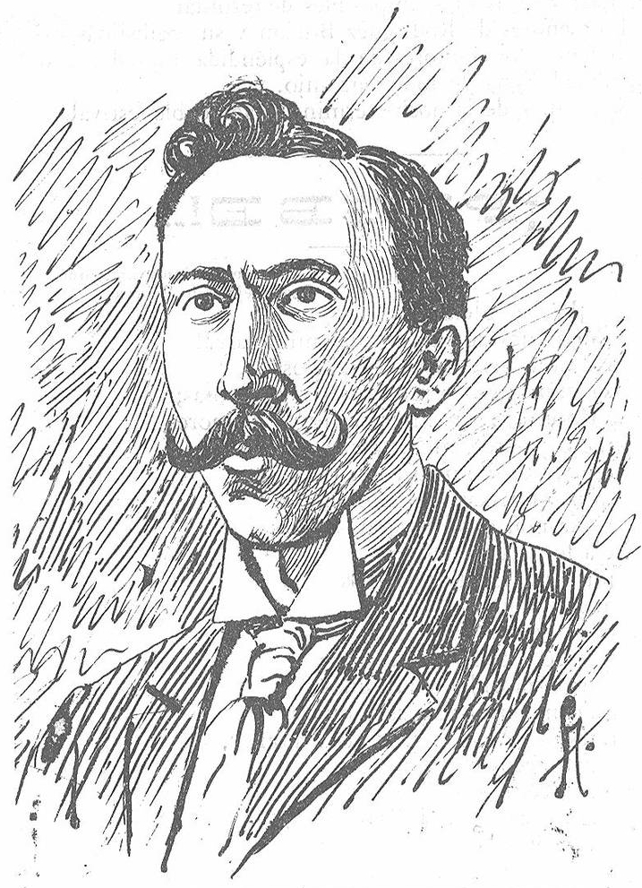 Juan González Montenegro